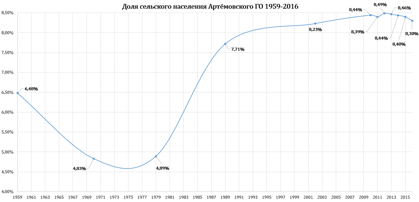 Доля сельского населения Артёмовского ГО 1959-2016